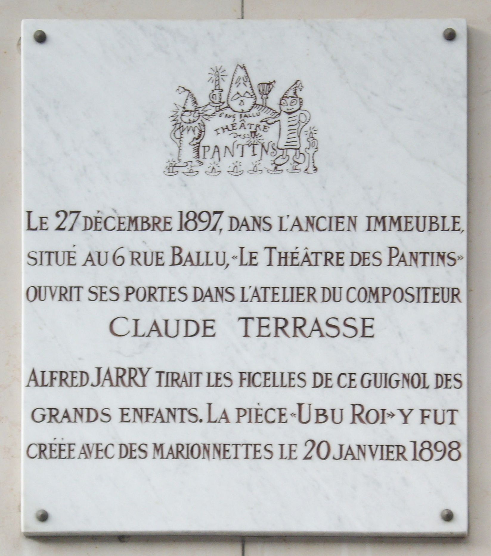 Plaque apposée au n° 6 de la rue Ballu, Paris 9e.« Le 27 décembre 1897, dans l'ancien immeuble situé au 6 rue Ballu, le Théâtre des Pantins ouvrit ses portes dans l'atelier du compositeur Claude Terrasse. Alfred Jarry tirait les ficelles de ce guignol des grands enfants. La pièce Ubu roi y fut créée avec des marionnettes le 20 janvier 1898. »